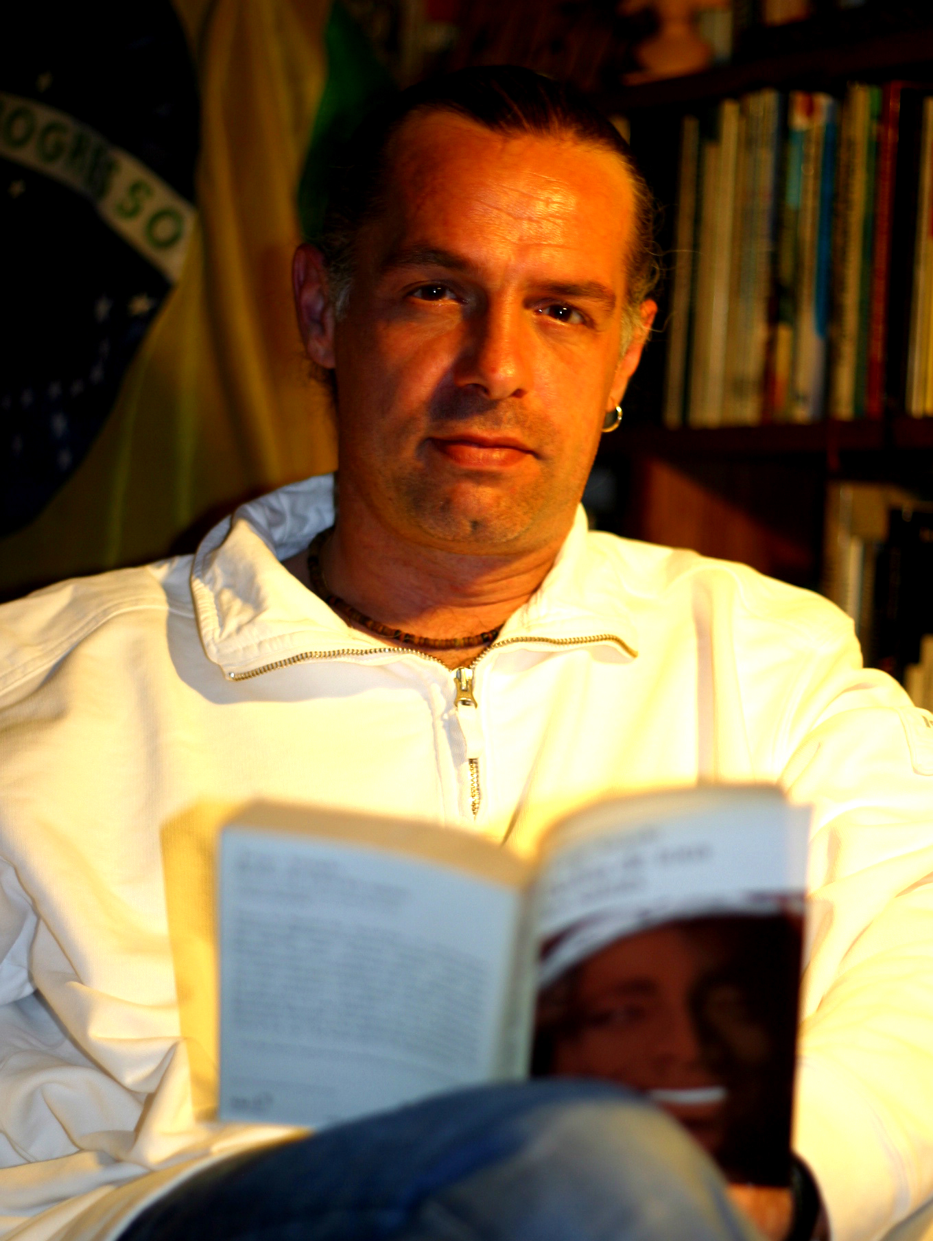 Le romancier Jean-Paul Delfino, lisant les oeuvres de Jorge Amado...